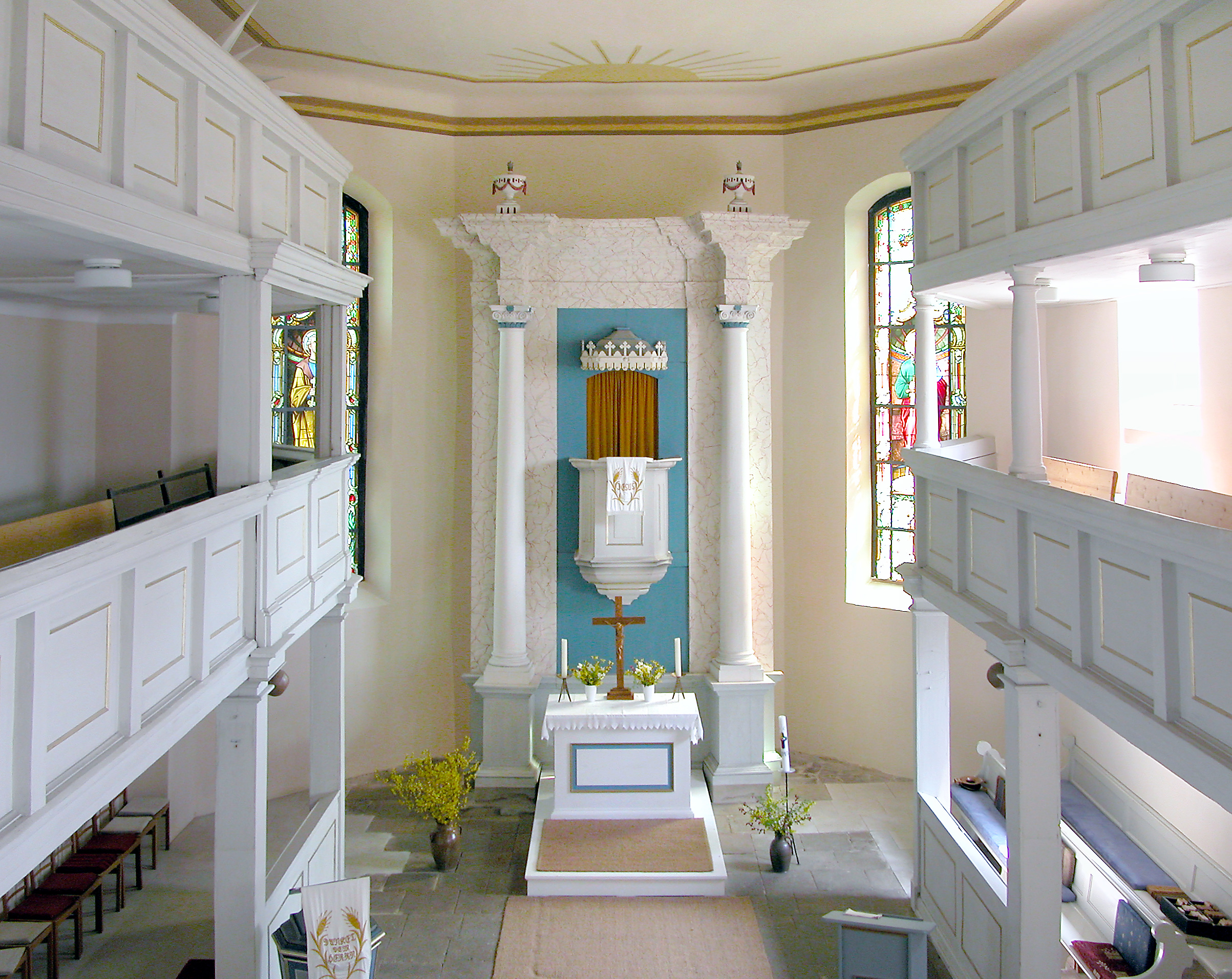 21.03.2009 04703 Bockelwitz: Dorfkirche, 1797 an Stelle einer älteren, baufälligen Kirche neu erbaut. Die Pläne stammen vom Amtszimmermeister August Bormann aus Wermsdorf, der den Bau auch zusammen mit dem Amtsmaurermeister Gottfried Wartig, beide aus Wermsdorf, ausführte. Kirchenpatron war Friedrich August von Carlowitz, der Besitzer des Ritterguts Kroptewitz. [DSCN35653.TIF]20090321010DR.JPG(c)Blobelt